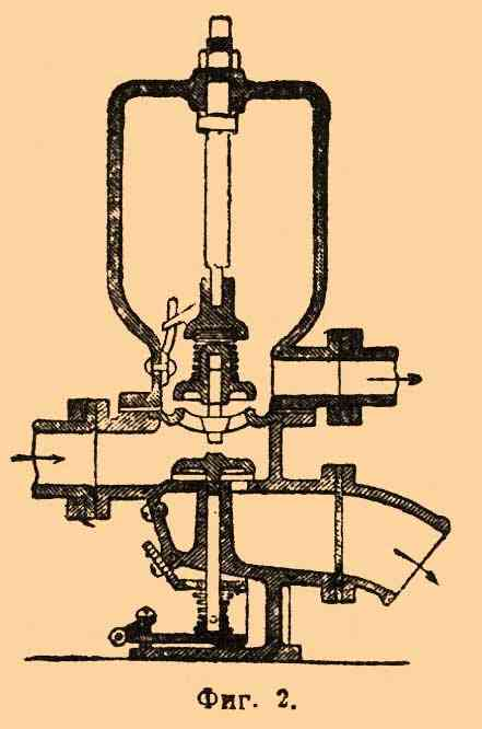 Таран гидравлический. Рисунок из Энциклопедического словаря Брокгауза и Ефрона, 1890-1907 г.